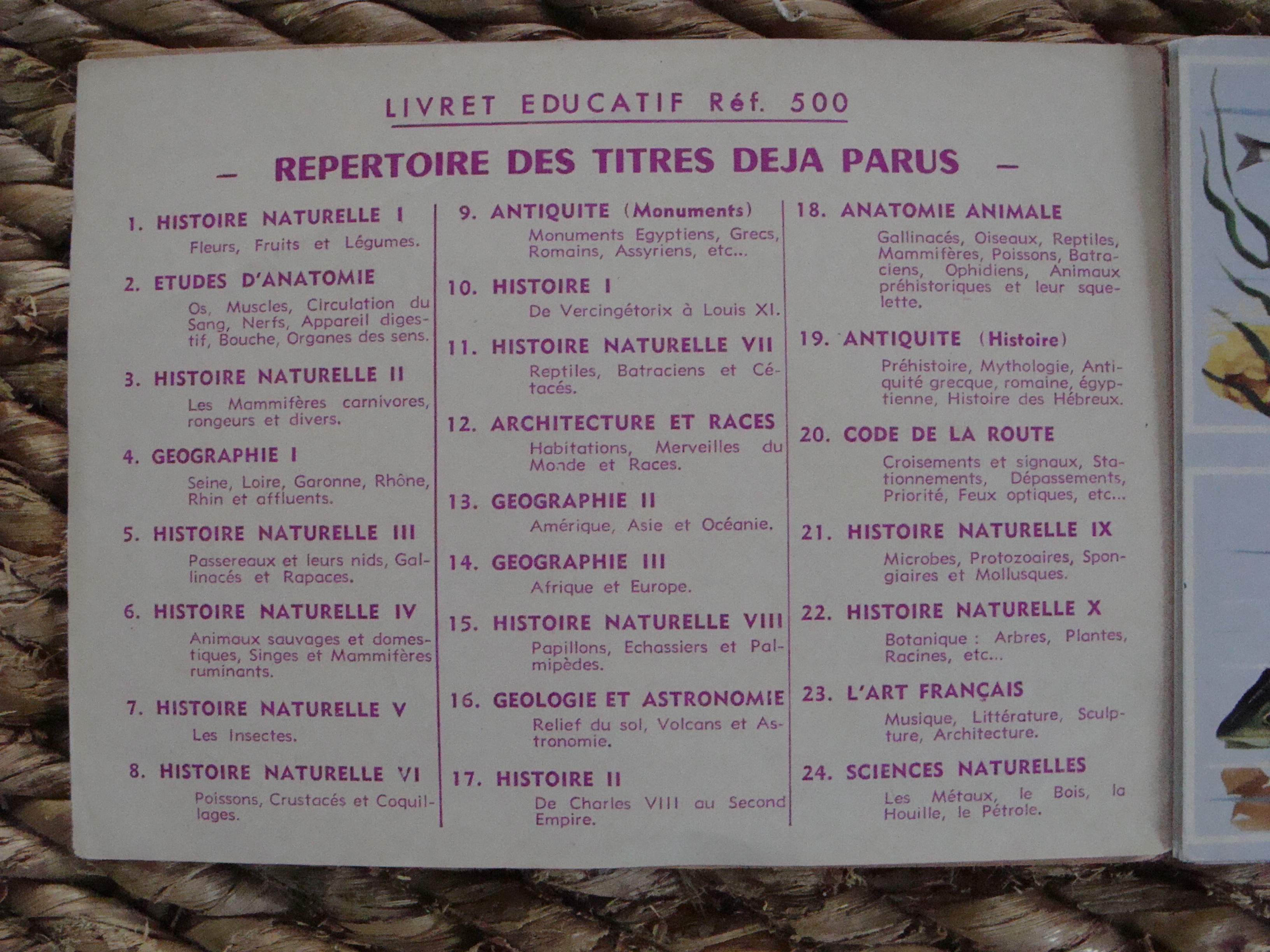 Il s'agit ici de préciser le répertoire des titres parus et l'emplacement pour la toute première édition entre 1960 et 1962. Ce ne sera plus le cas dès l'édition de 1963 où le répertoire apparaîtra au dos des livrets